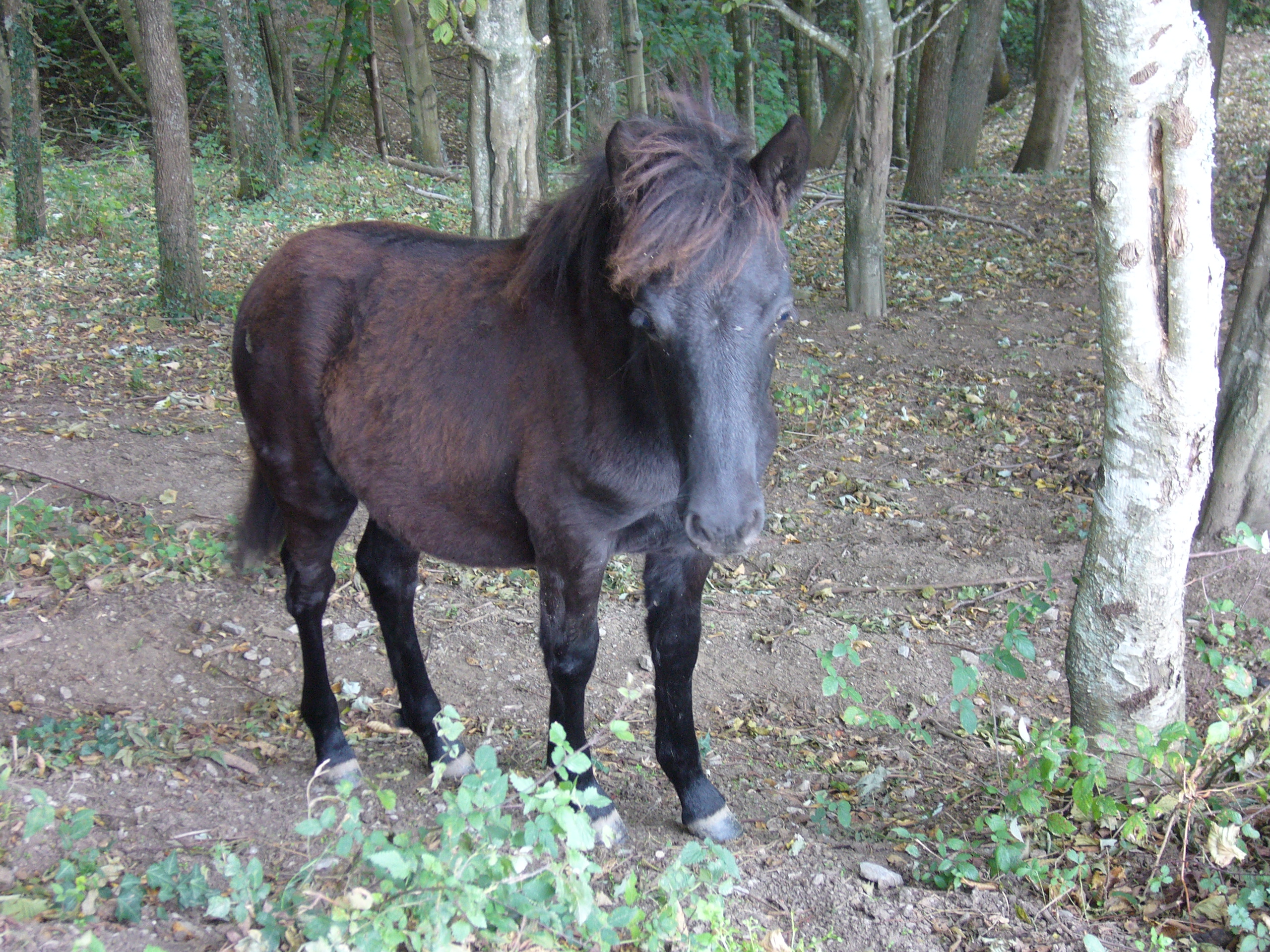 Pottoka gaztea baso batean.